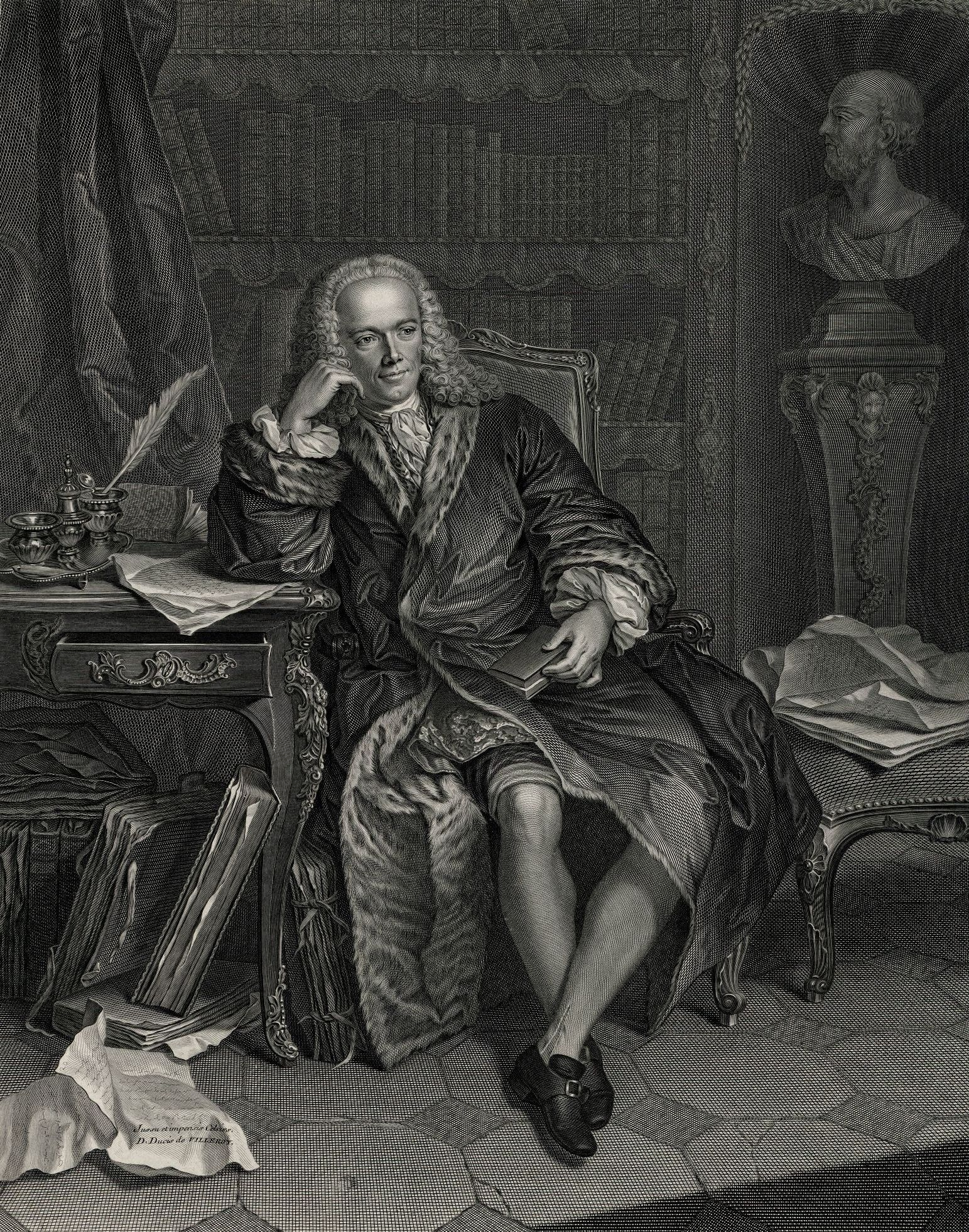 Portrait de François Quesnay (1694-1774)